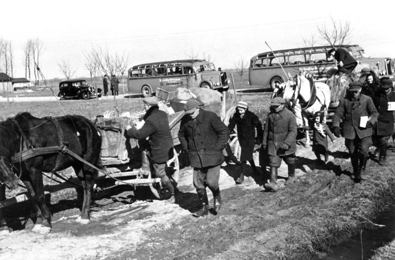 Wartheland, Transport von Umsiedlern Wartheland Ansiedlung dt. Bauern aus Ostpolen Mai 1940 [Wartheland.- Transport deutschstämmiger Umsiedler aus Ostpolen.]